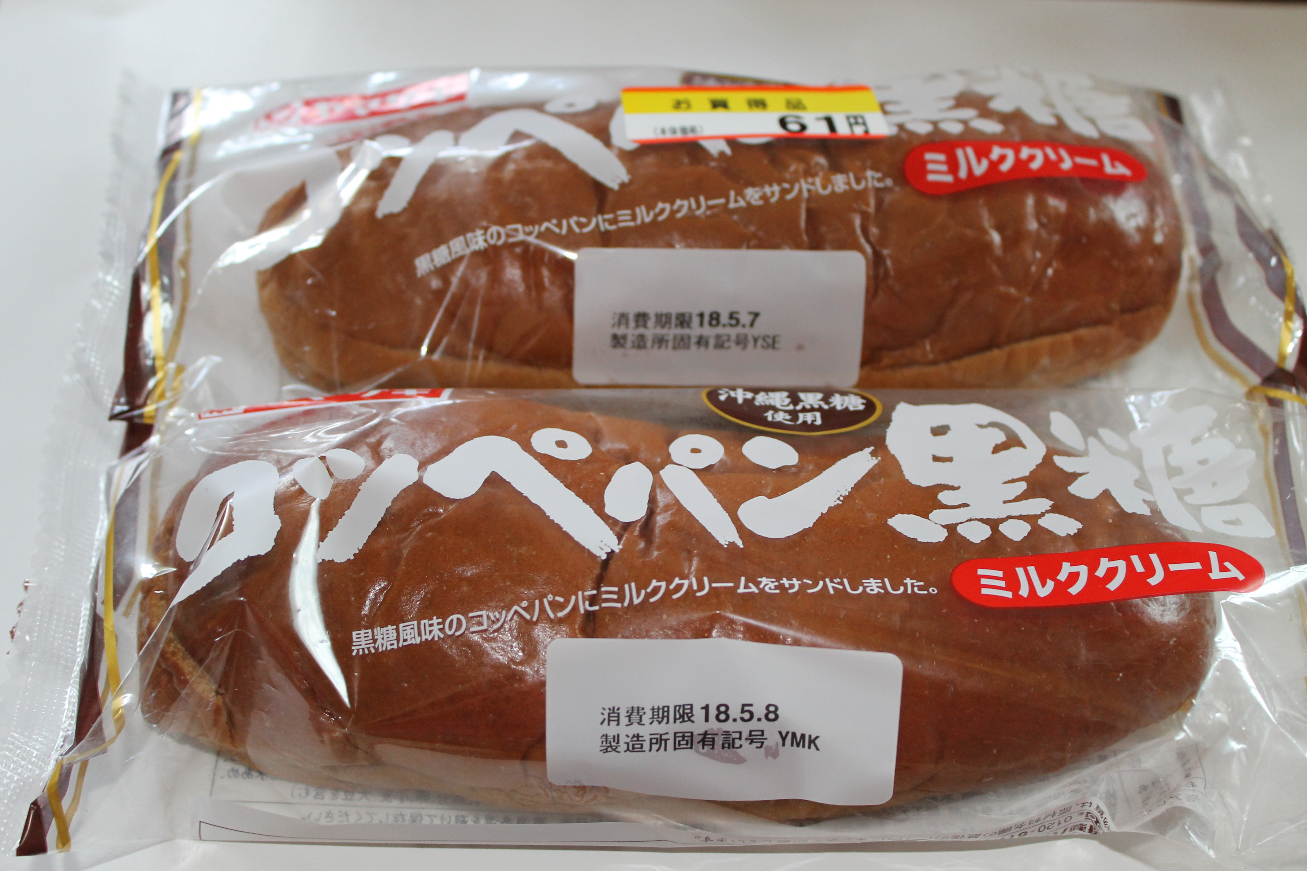 ヤマザキ 黒糖コッペパン 上が仙台工場製 下が松戸第一工場製